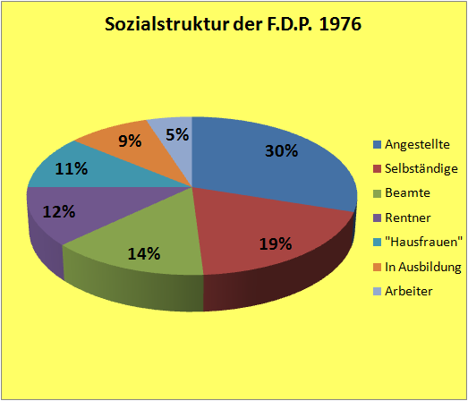 Sozialstruktur der FDP (Freie Demokratische Partei) in der Bundesrepublik Deutschland 1976 nach Datenquellen von Autor Helmut Schorr, Gesellschaftlicher Wandel und Parteienstruktur in der Zeitschrift "Stimmen der Zeit", Heft 5, S. 308, Freiburg 1978.